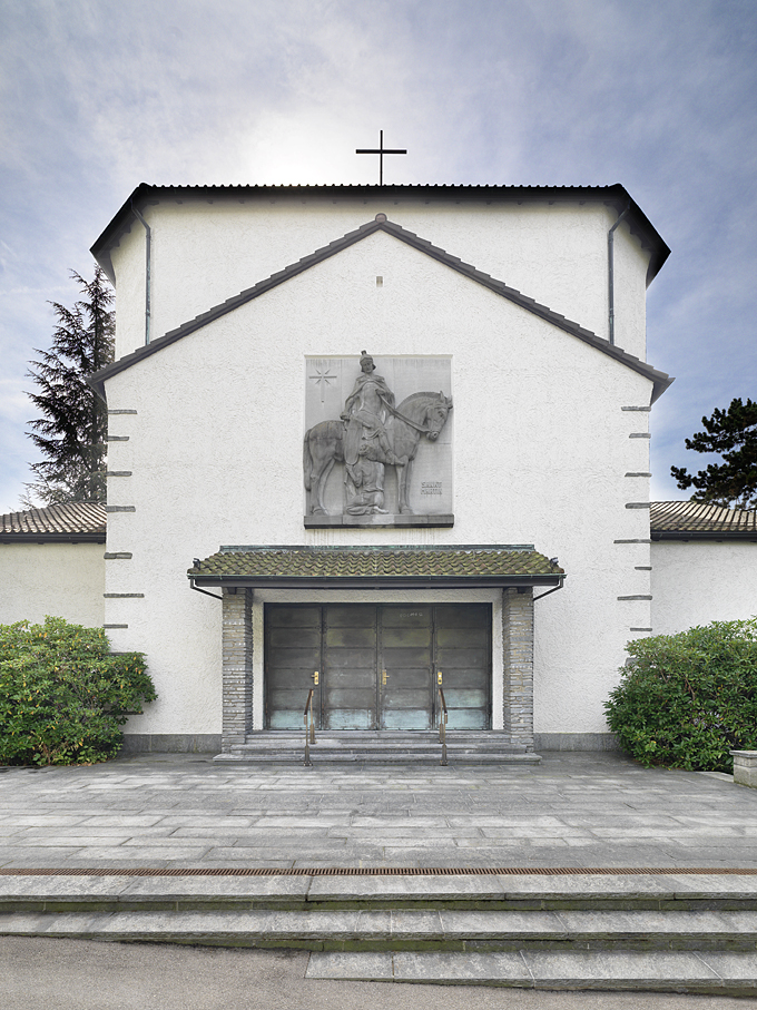 Römisch-katholische Kirche St. Martin, Zürich, Aussenaufnahme von vorne